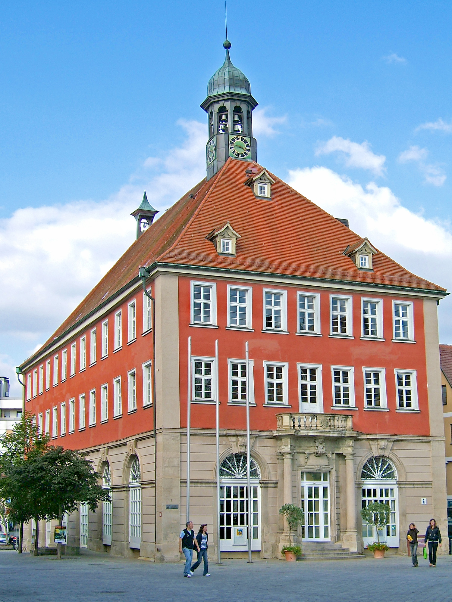 Rathaus in Schorndorf, Deutschland